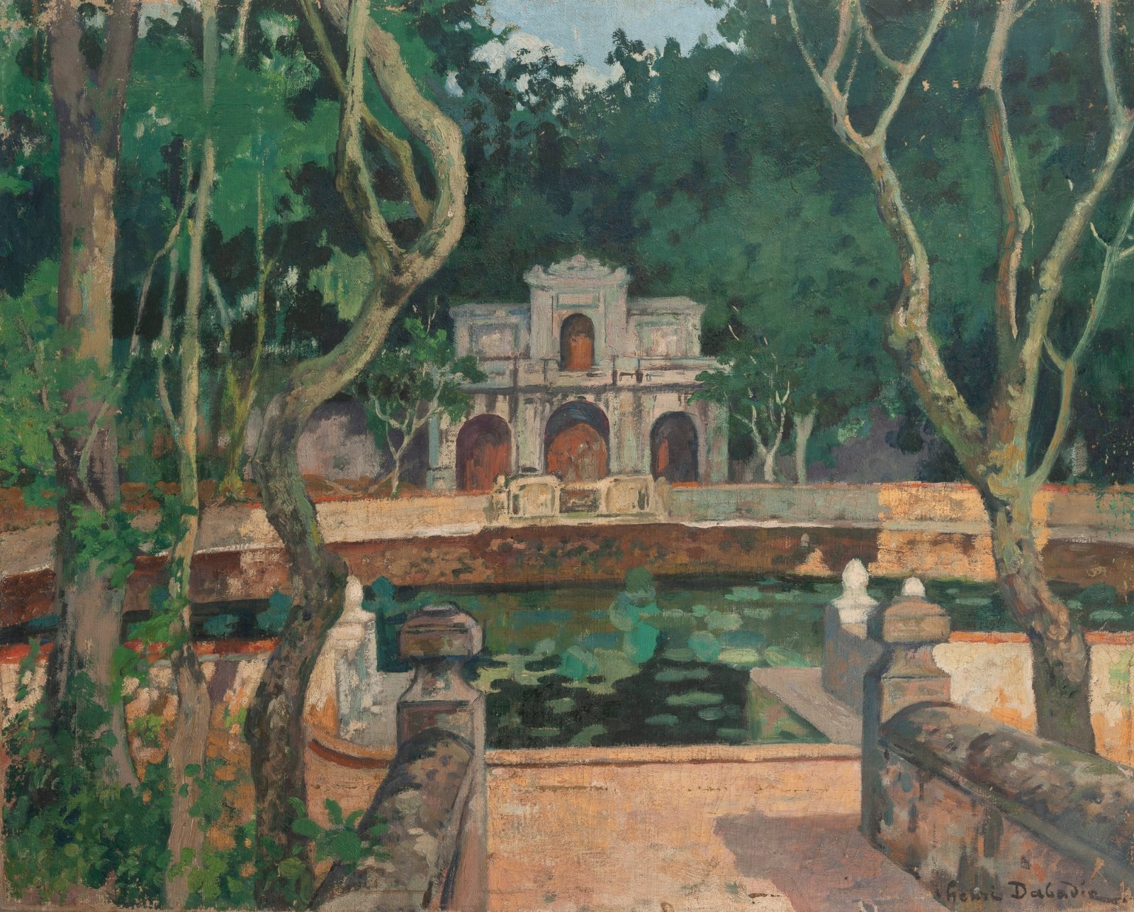 Nymphée dans un parc